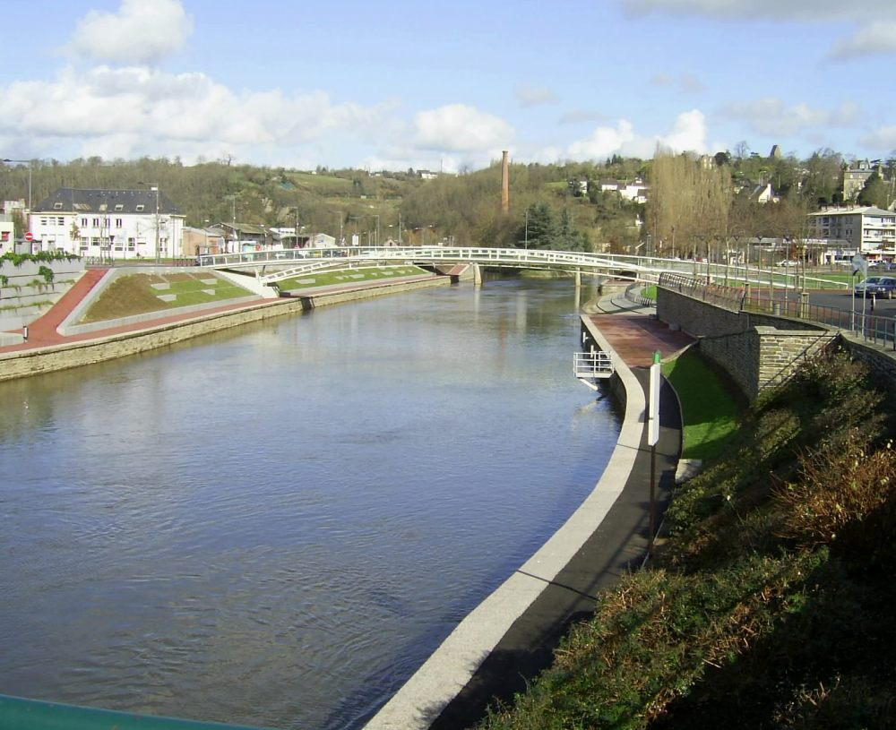 Le Fleuve la Vire dans la ville de Saint-Lô avec vue sur la plage verte et la cheminée de l'ancienne papeterie